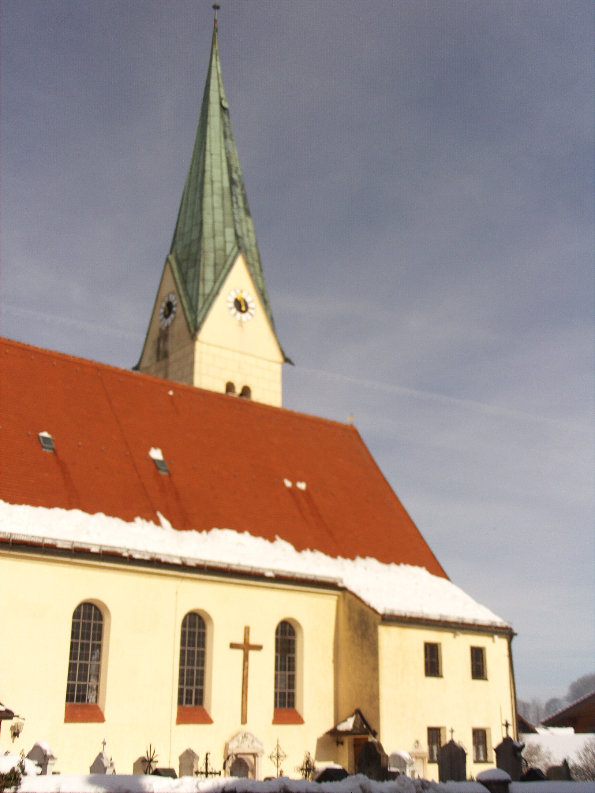 Kirche in Törwang am Samerberg, Landkreis Rosenheim